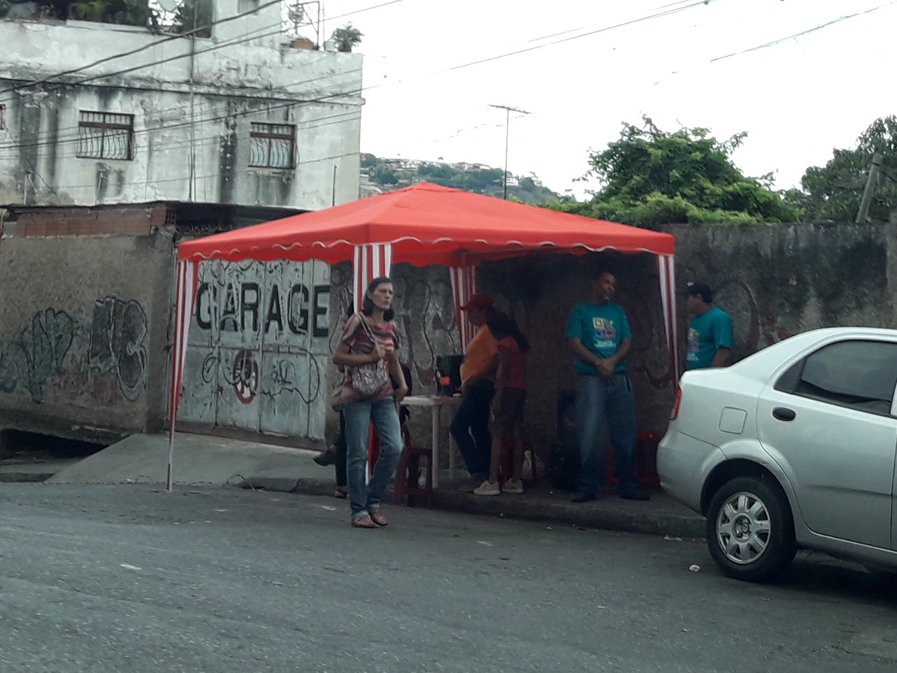 Punto rojo cerca de un centro electoral en Caracas, violatorio de las leyes electorales, durante las elecciones presidenciales de 2018.